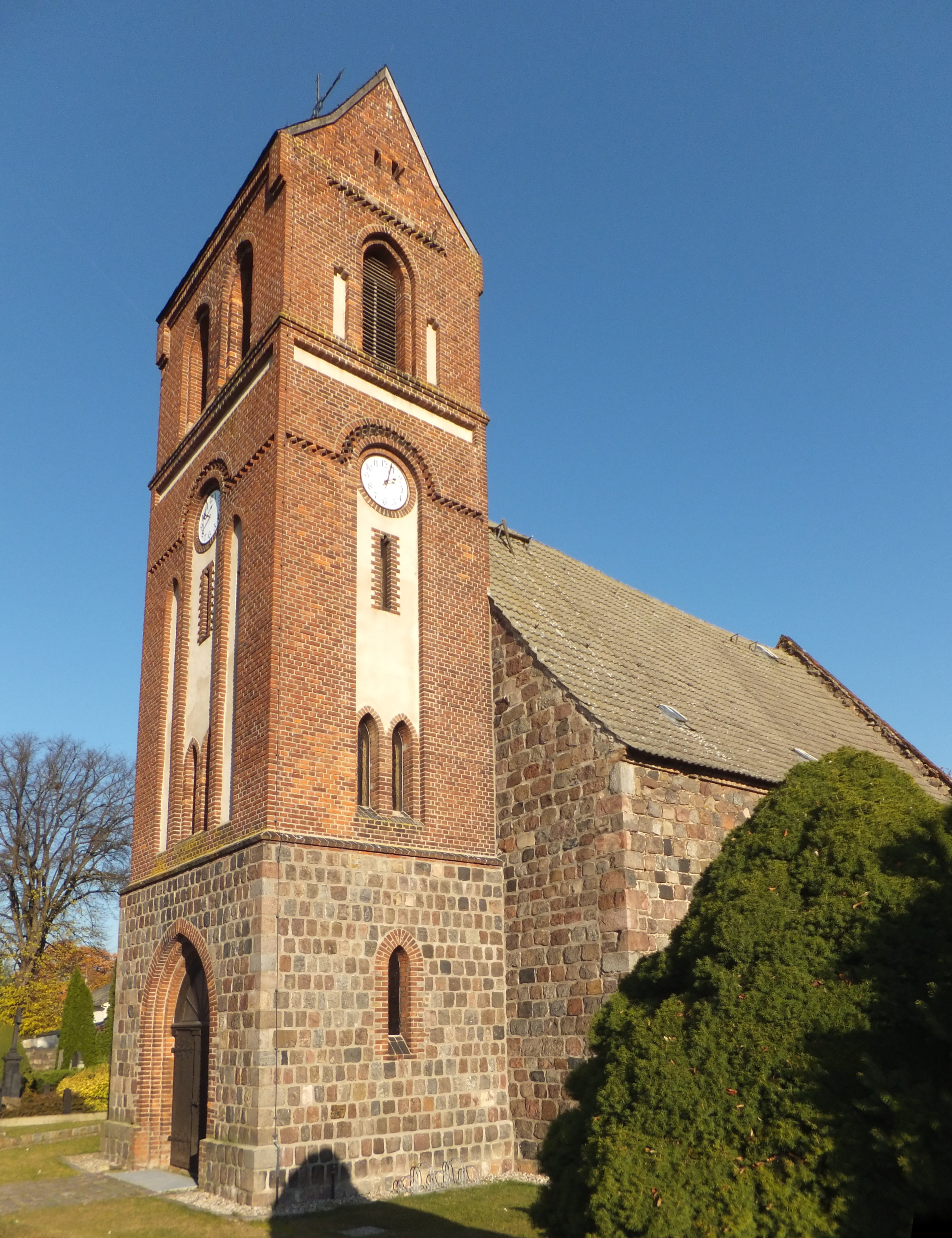 Südwestansicht der Dorfkirche Schwanebeck